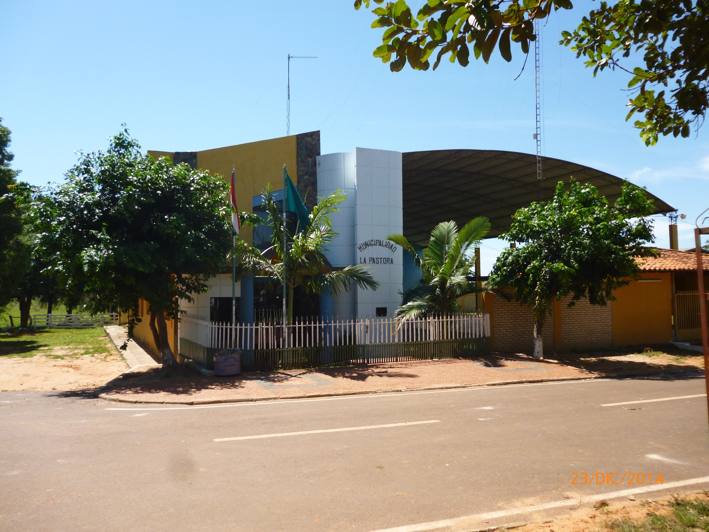 Municipalidad de La Pastora